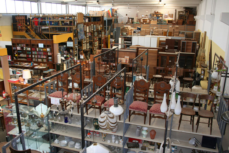 Interno del mercatino dell'usato Di Mano in Mano di Cambiago